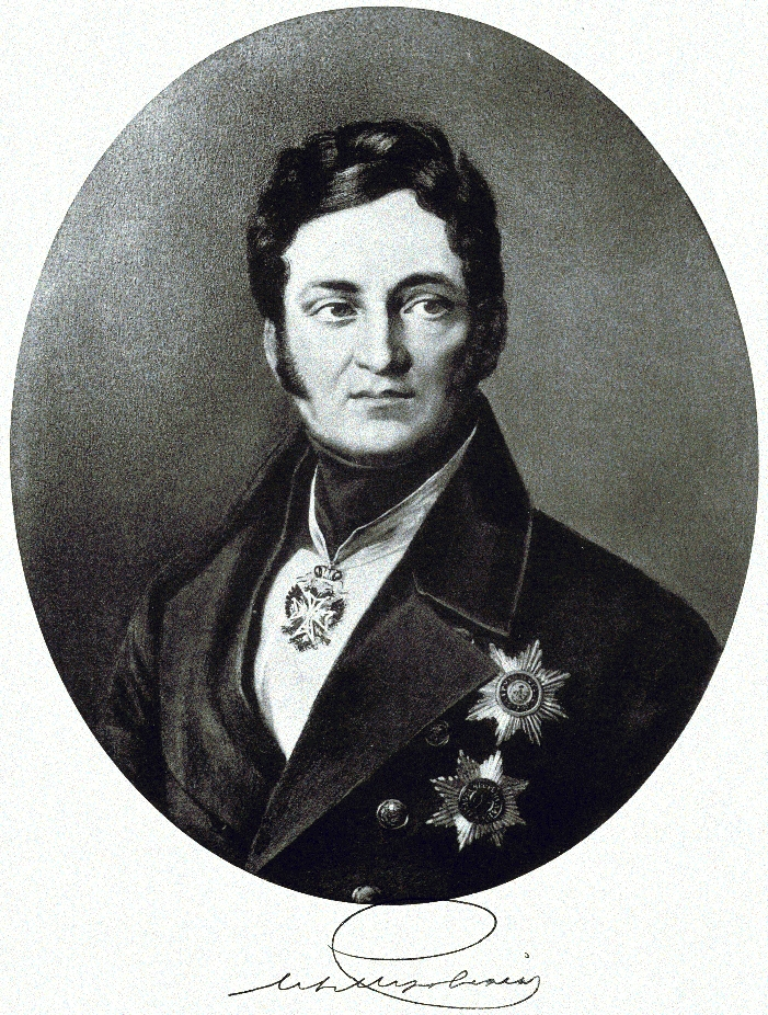 Граф Лев Алексе́евич Перо́вский (20 сентября 1792 года — 21 ноября 1856 года) — государственный деятель Российской империи.